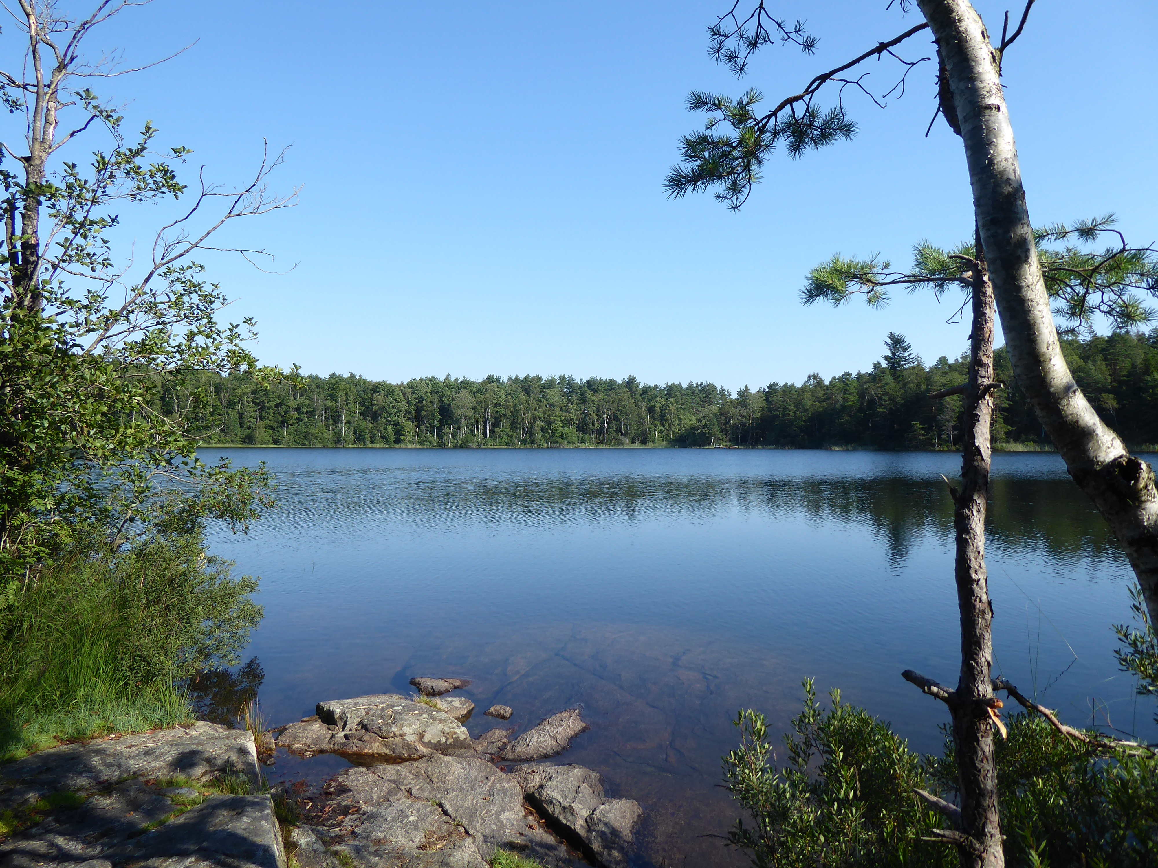 Lilla Hålsjön (Västergötland, Sverige) från S den 7 augusti 2020.